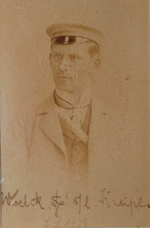 Ausgeblichene Porträtfotografie von Kurt Woelck (1882-1958)